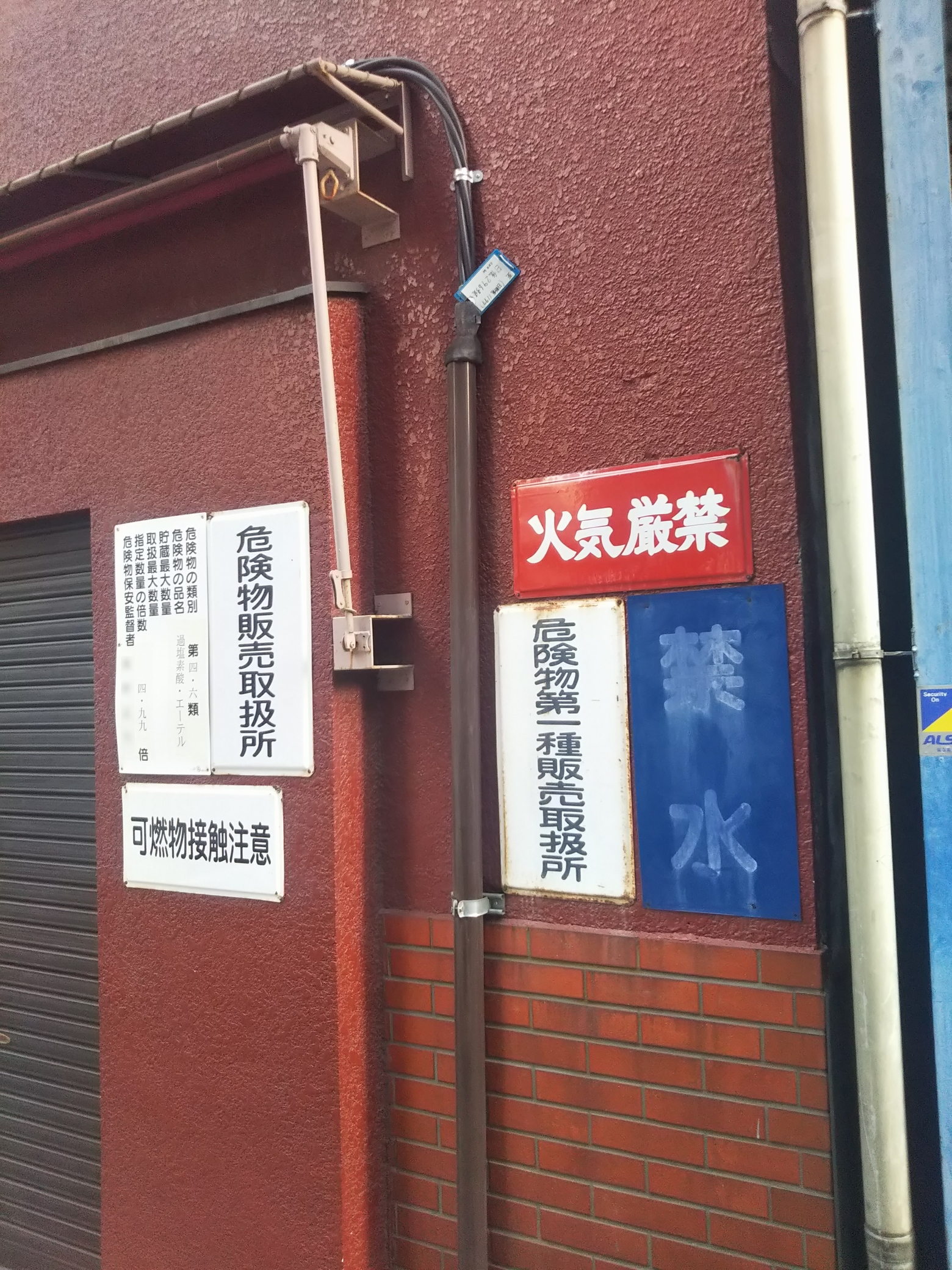 危険物販売取扱所の標識。東京都中央区にて